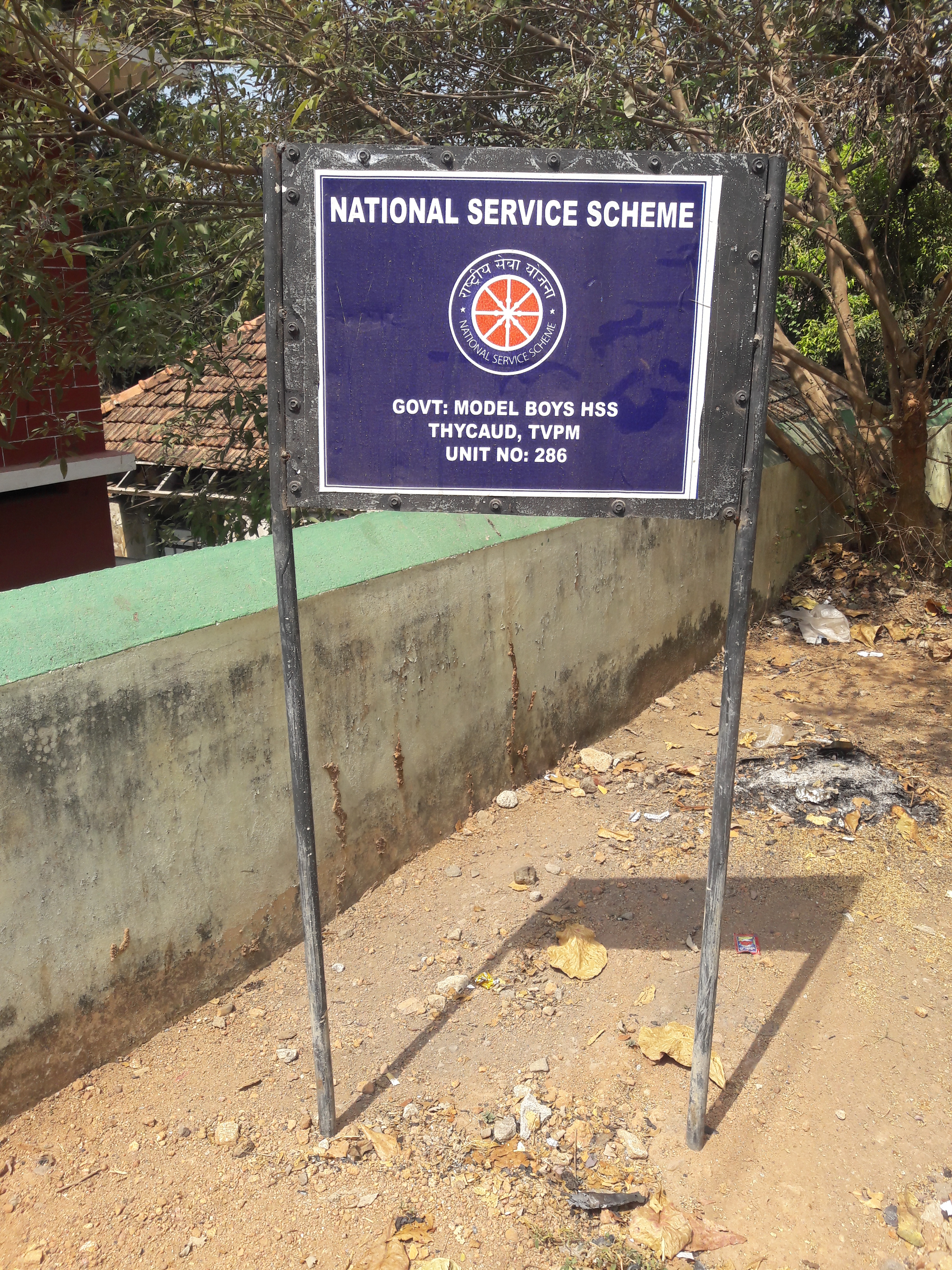 ഗവ. മോഡൽ ബോയ്സ് എച്ച്.എസ്.എസ്, തൈക്കാട്നാഷണല്‍ സര്‍വീസ് സ്ക്കീം നാമ ഫലകം.